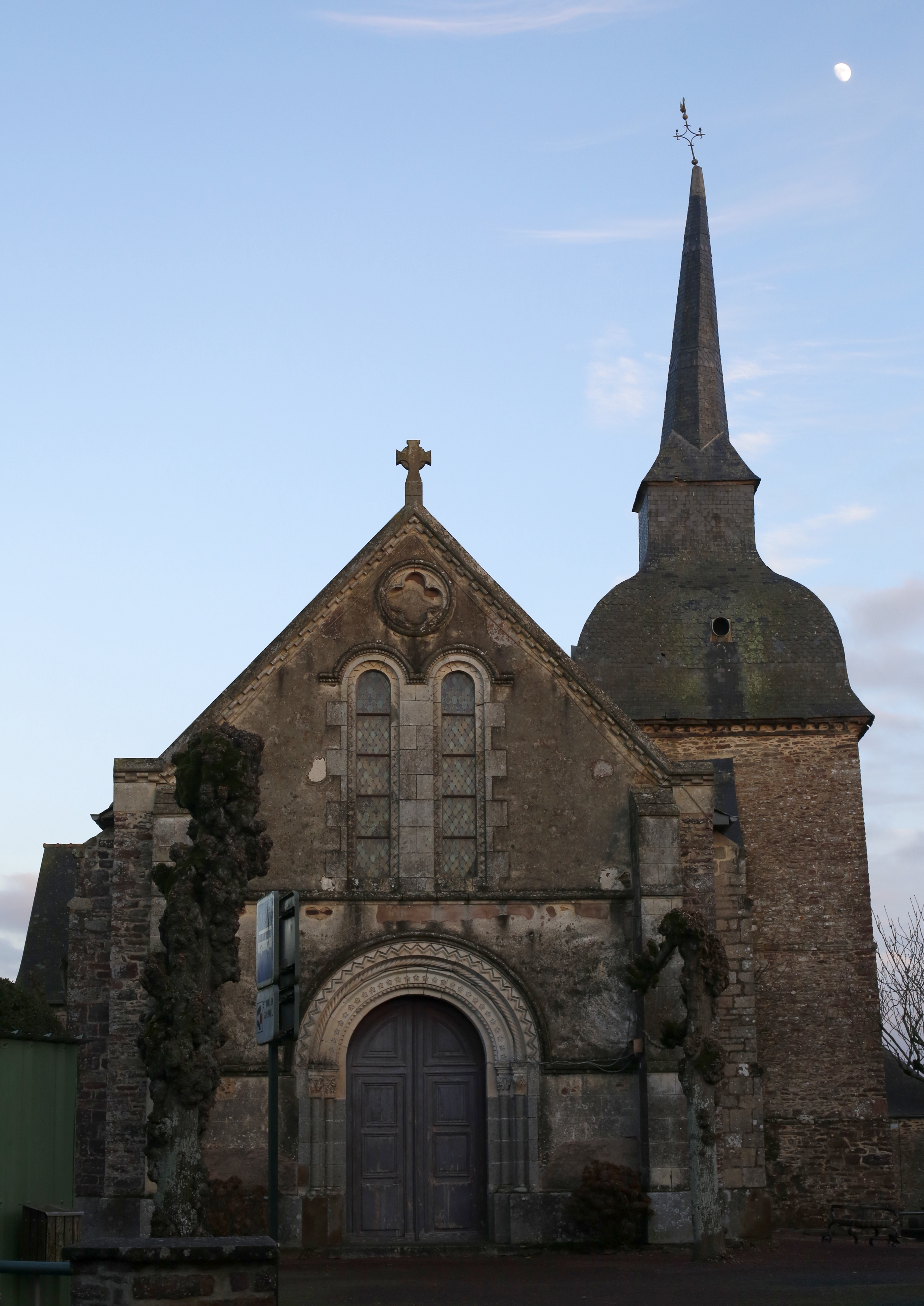 Église Saint-Malo de Saint-Malon-sur-Mel.